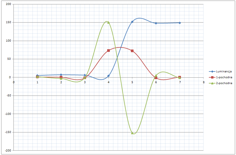 Rysunek przedstawia rozkład luminancji na przestrzeni kilku pikseli oraz obliczone pierwszą i drugą pochodną po tejże luminancji.